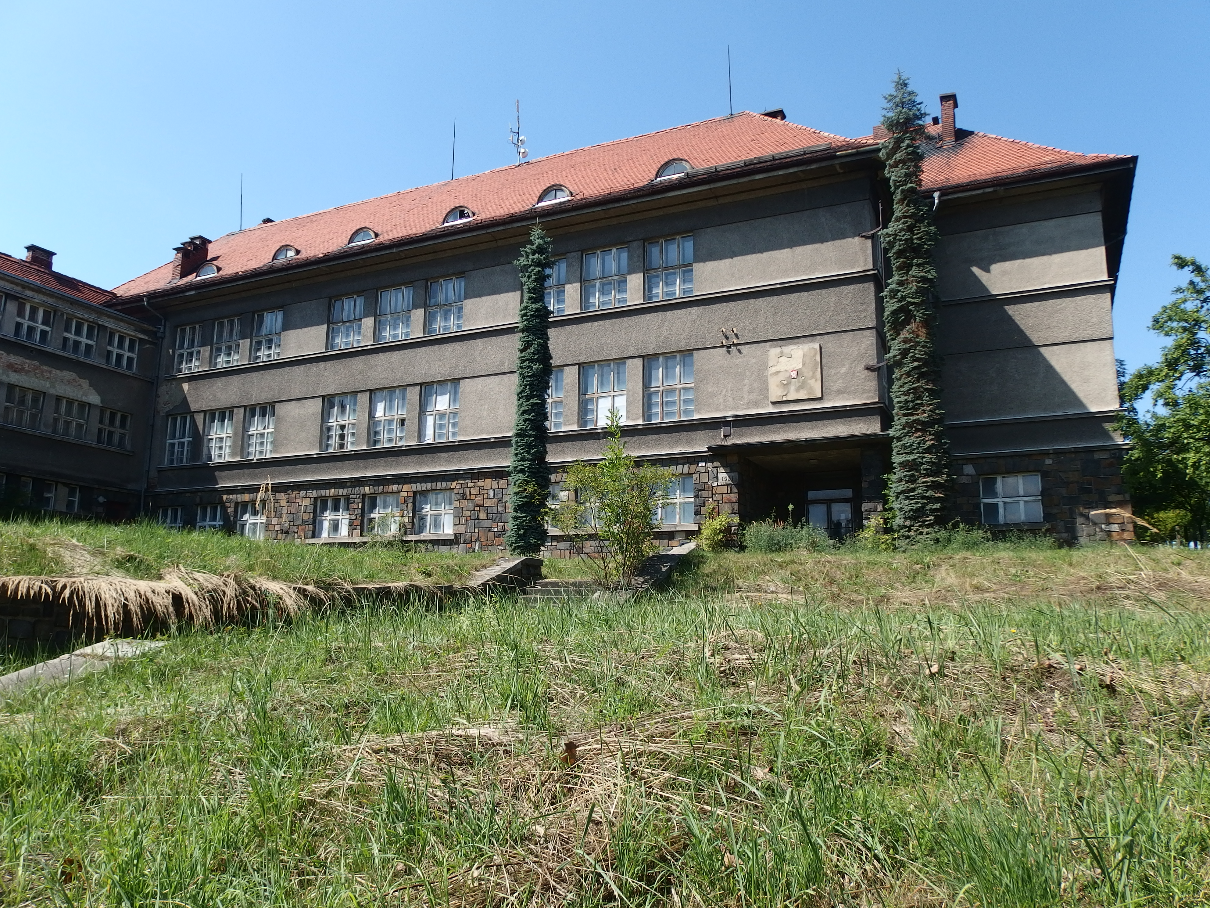 Starý Jičín, okres Nový Jičín, Česká republika, část Heřmanice.